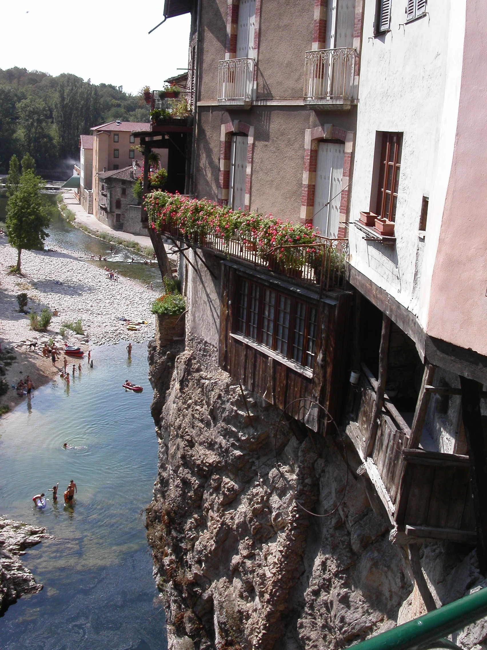 Les maisons suspendues de Pont-en-Royans